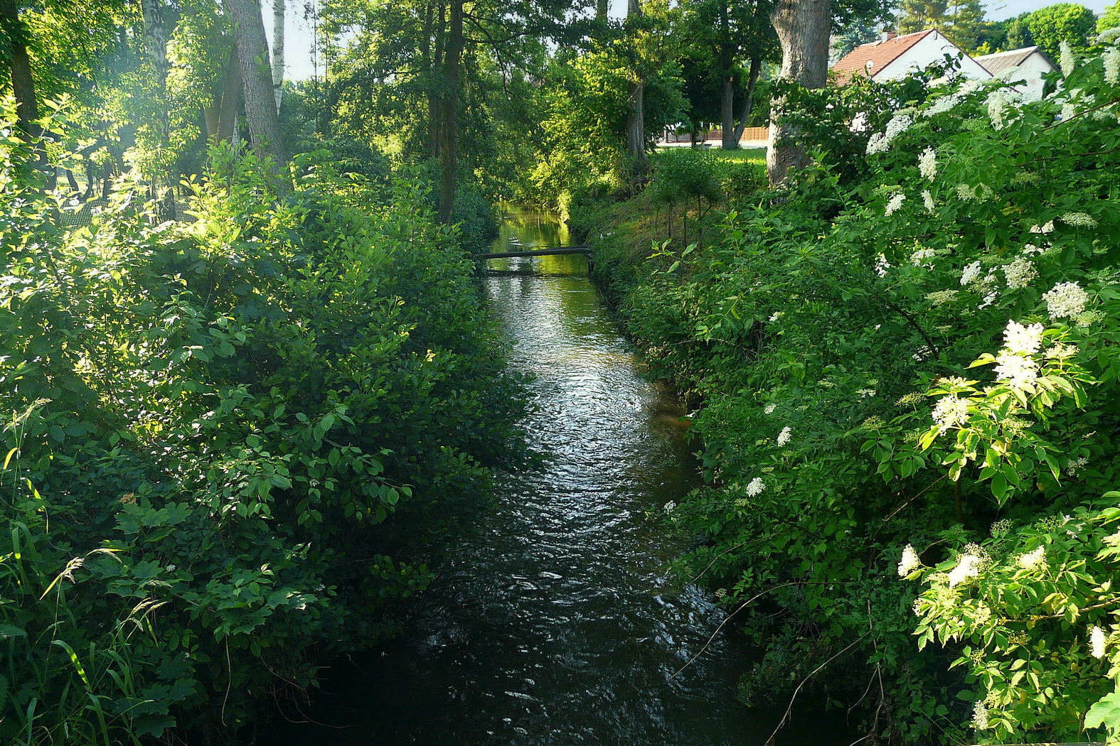 Kněžmostka v Bakově nad Jizerou